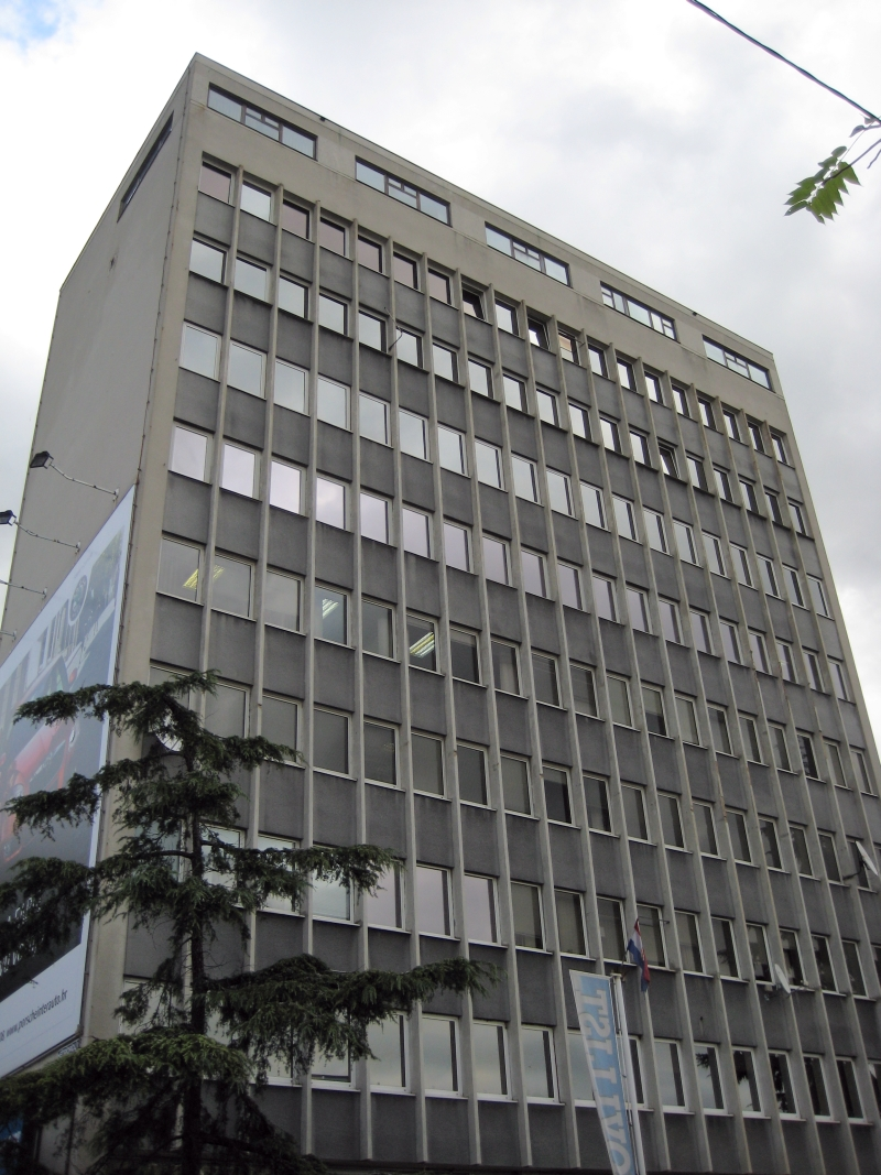 zgrada Novog lista u Rijeci